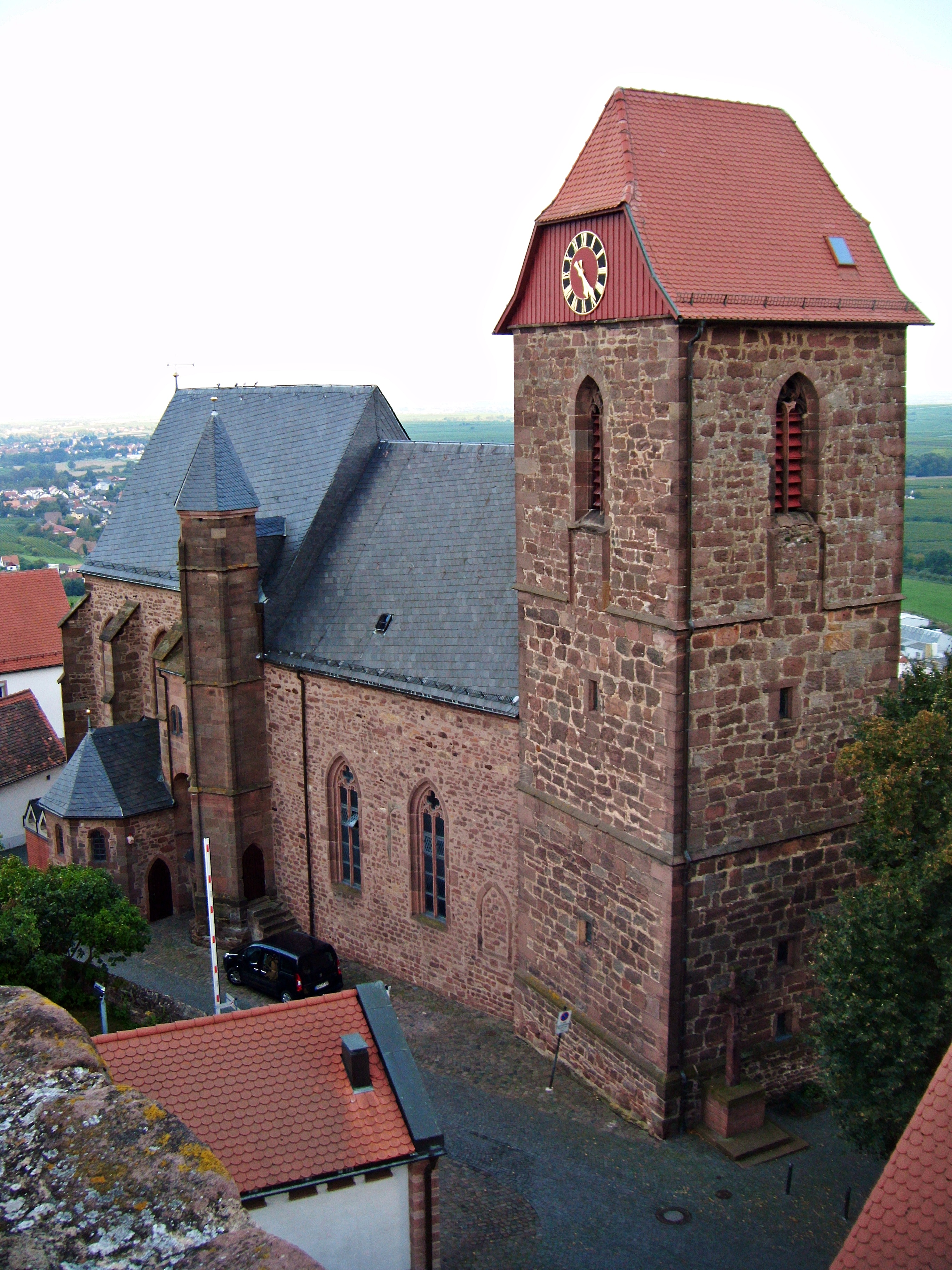 Neuleiningen, kath. Kirche St. Nikolaus, vom Burgturm aus